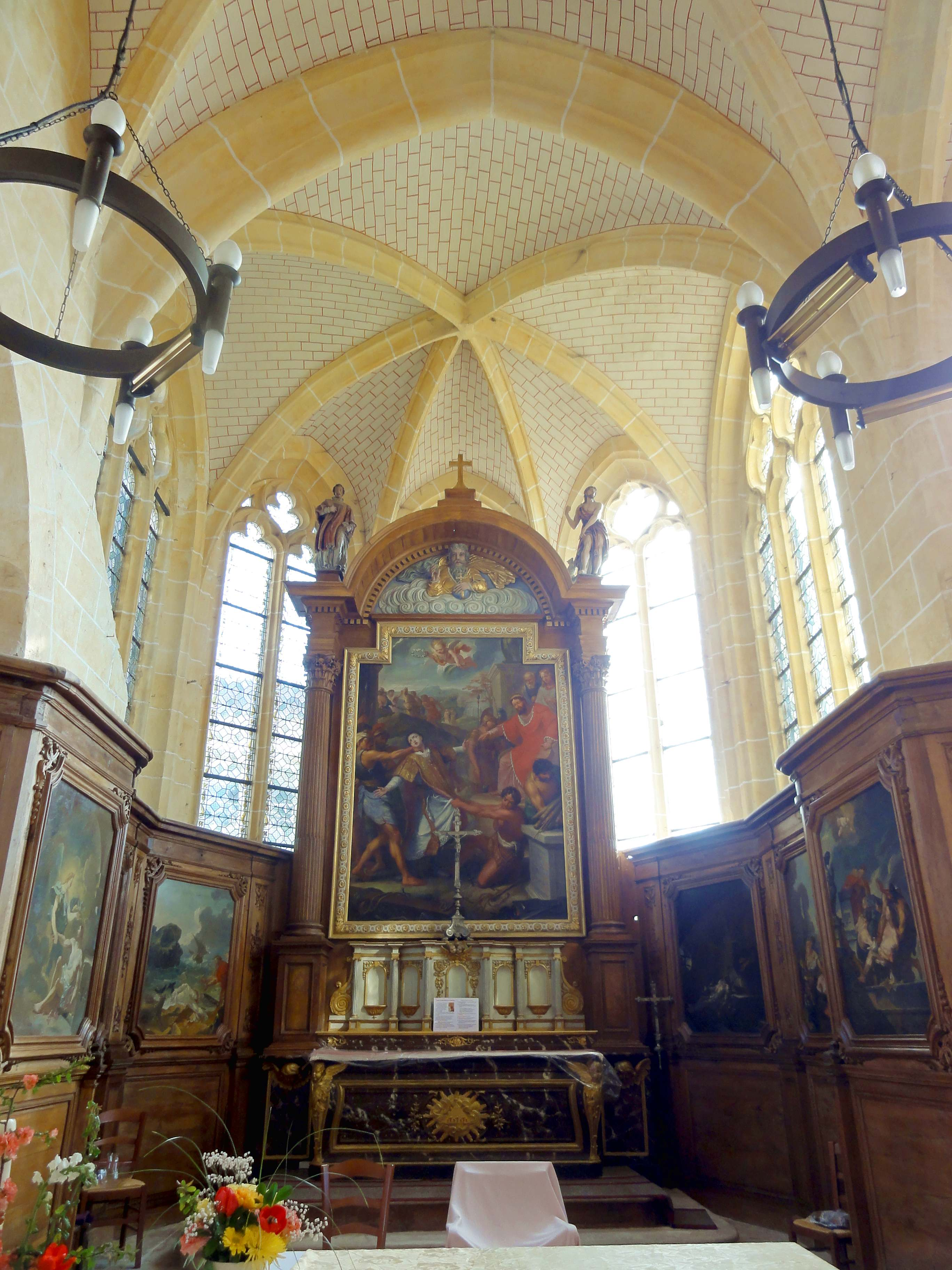 Interieur de l'église (voir titre).